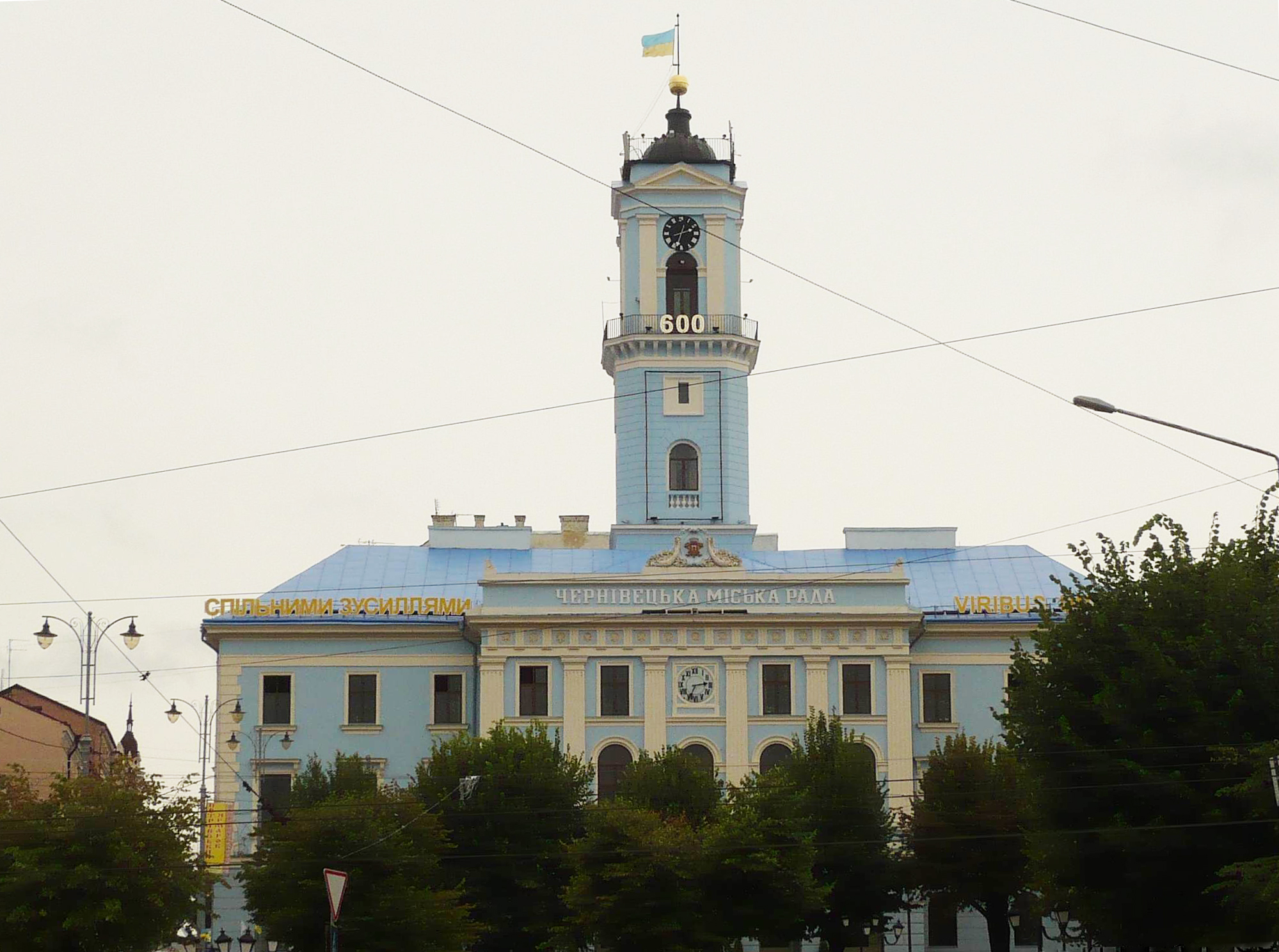 Czerniowce, Ratusz, 2009 r.